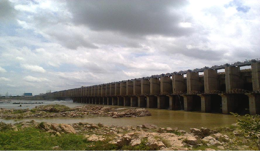 ప్రియదర్శిని జూరాల ప్రాజెక్టు